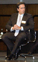 Wolfgang Büchner als Teilnehmer des Konferenz-Panel "Macht und Ohnmacht im politischen Journalismus" des Deutschlandfunks